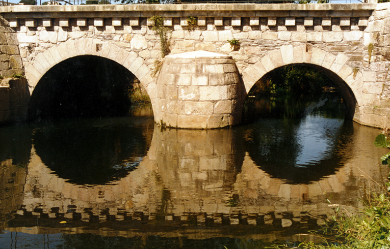 Ponte vella do Mazadoiro (Sarria)